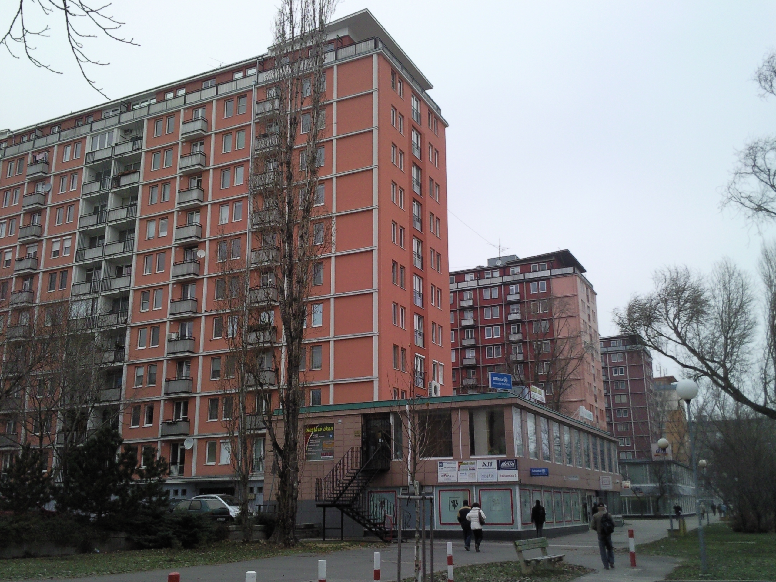 Račianska street in Bratislava, appartment blocks